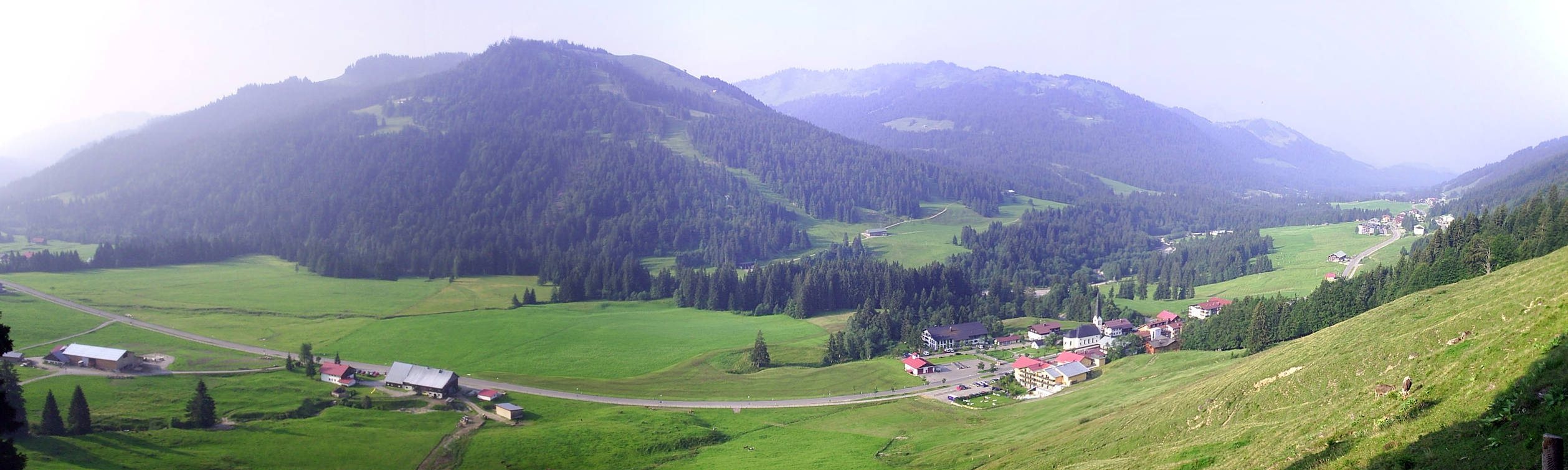 Panorama auf Balderschwang